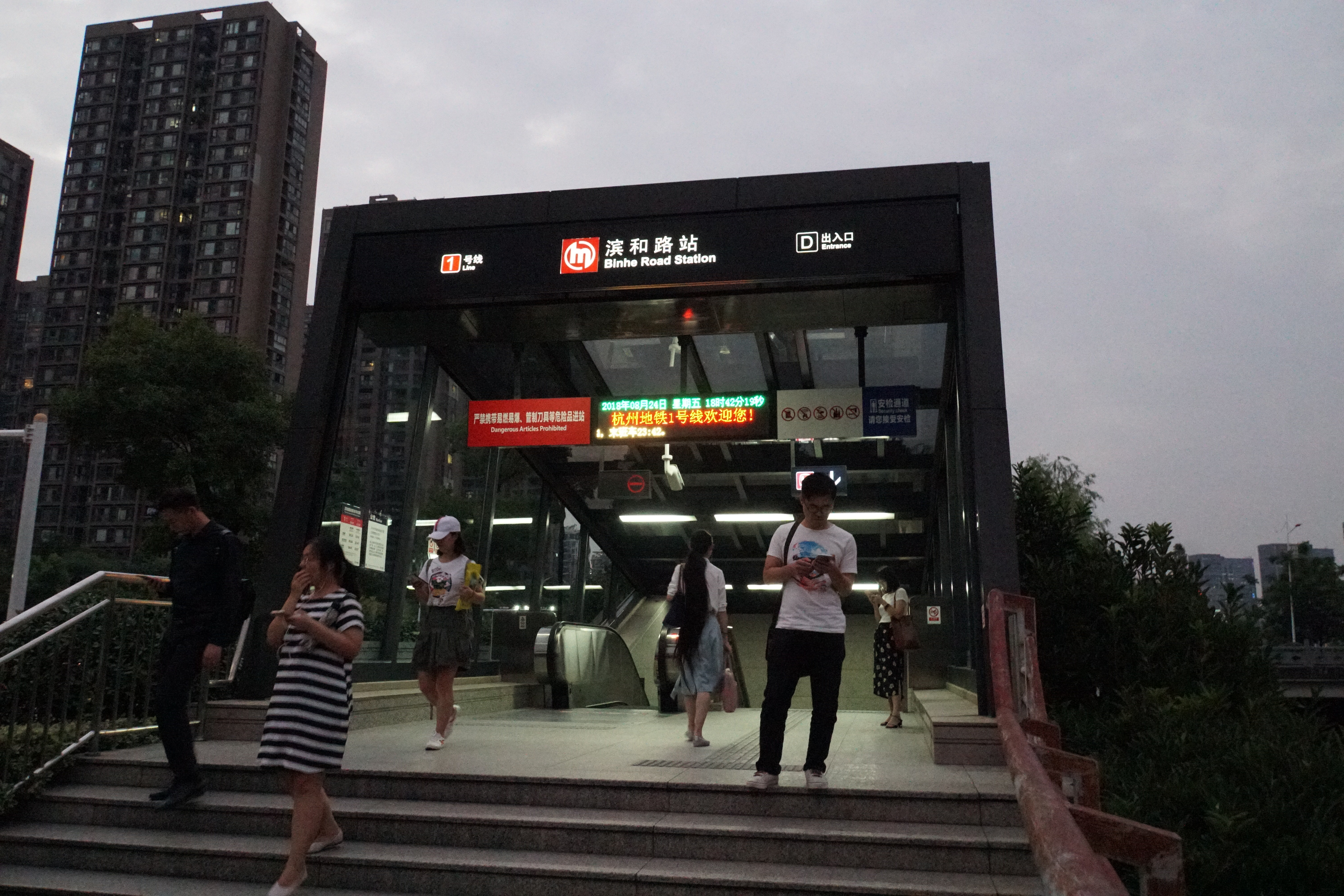 滨和路站D出入口